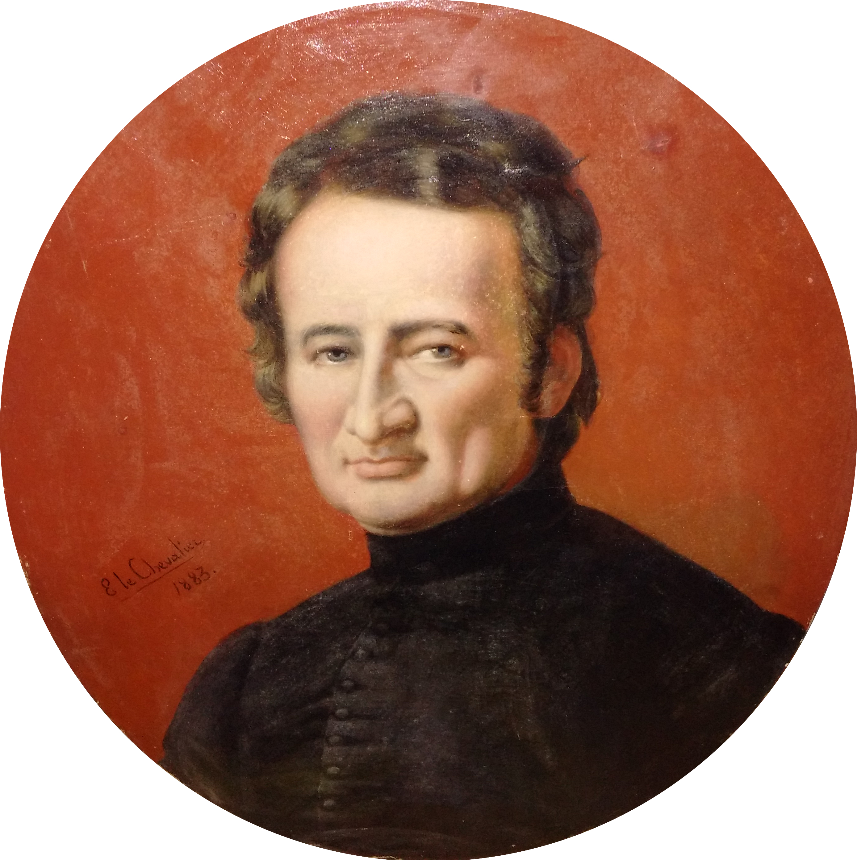 Poltred Yann-Vari de Lamennais breur Félicité Robert de Lamennais gant E.Le Chevalier 1883